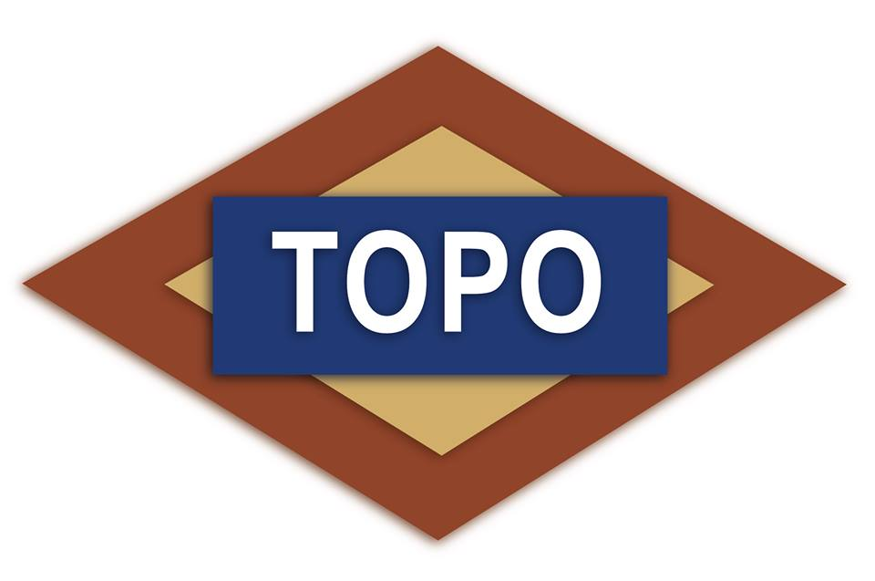 Logo de la banda de rock madrileña Topo.